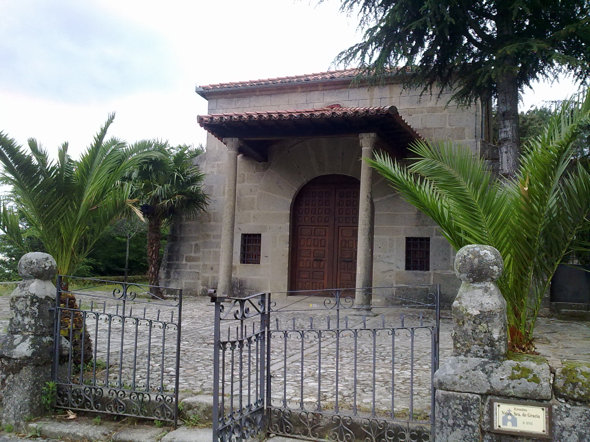 Ermita de Ntra. Sra de Gracia